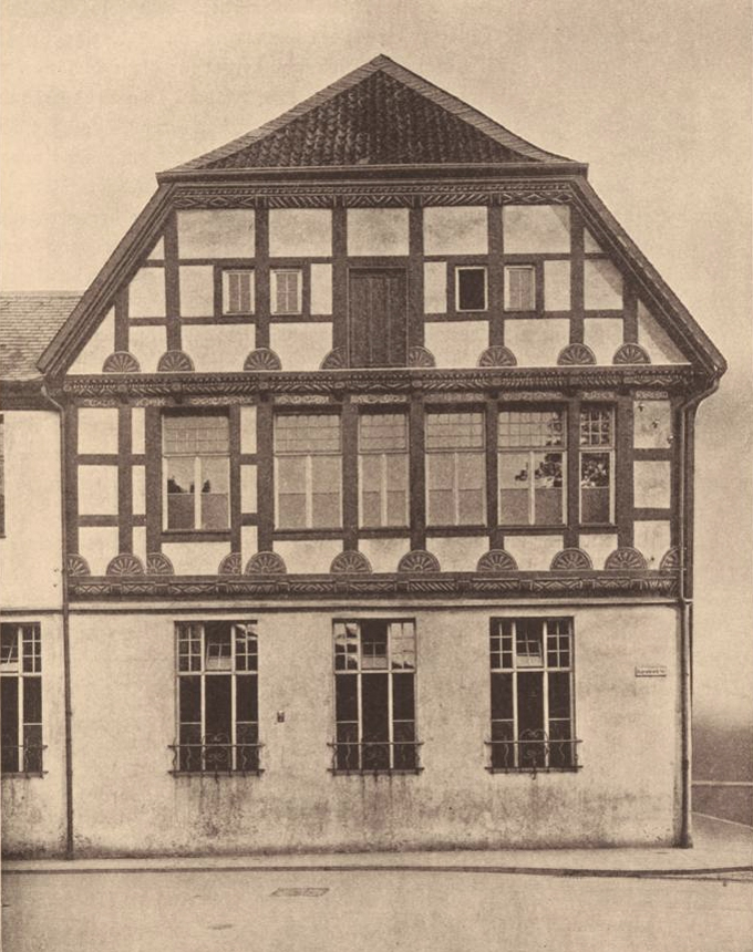 Wörmannshof Bielefeld, Ansicht nach 1906